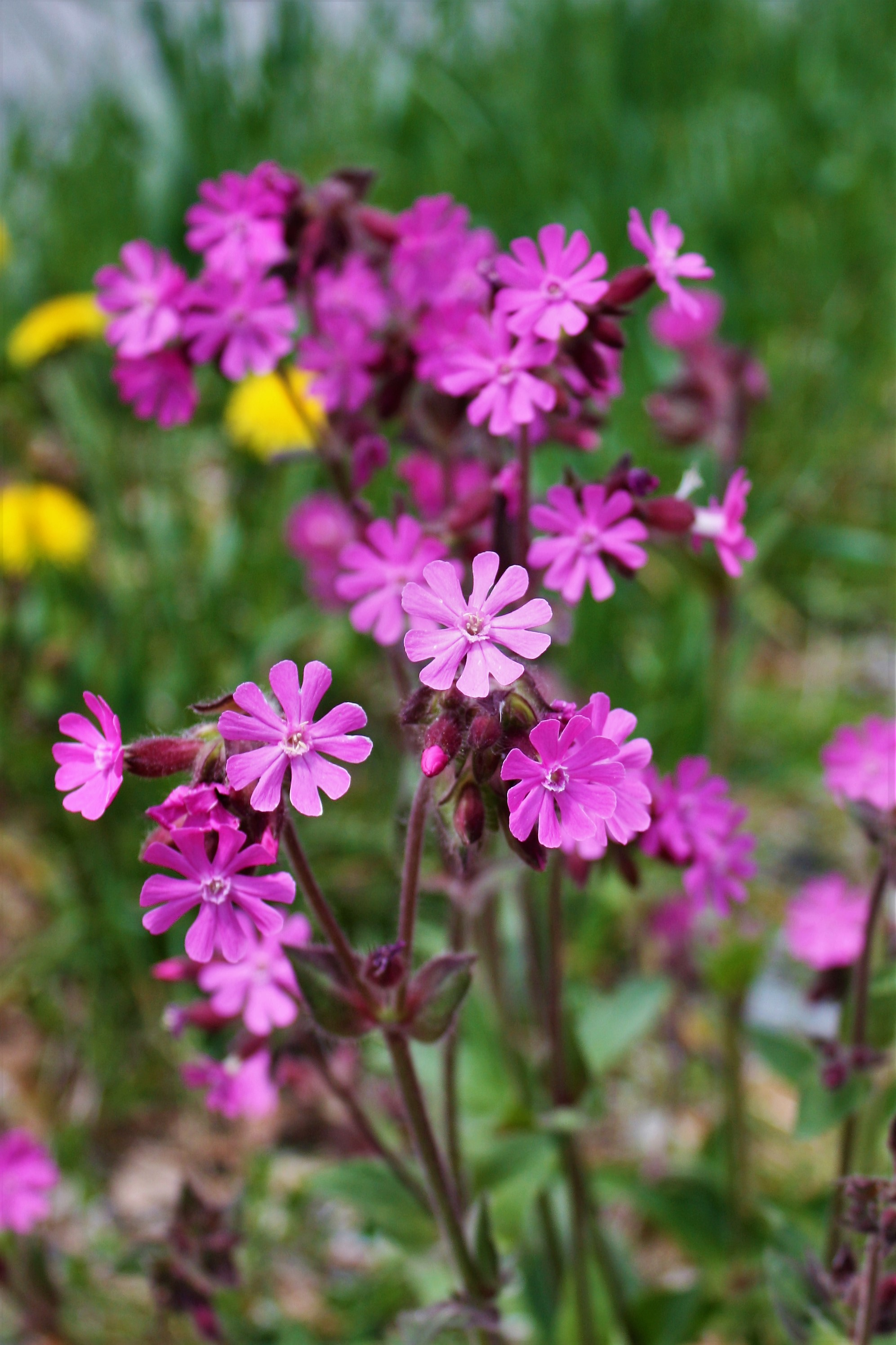 Blume am Großen Arbersee